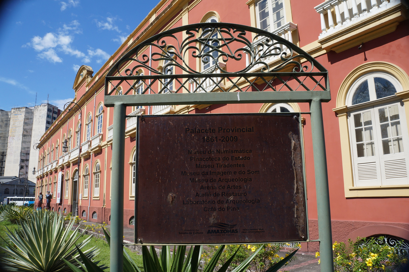 O Centro Cultural dos Povos da Amazônia reuniu nesta segunda-feira (25), em Manaus, cerca de 100 artistas e produtores amazonenses interessados em saber mais sobre os mecanismos públicos de fomento à produção de arte e cultura. Eles participaram de mais uma edição do Circuito #CulturaGeraFuturo, série de encontros promovido pelo Ministério da Cultura (MinC) para ampliar o alcance da política cultural e dos instrumentos de incentivo ao setor do Governo Federal. Estudantes de dança, coreógrafos, escritores e diretores artísticos foram alguns dos participantes do encontro, iniciado pela manhã com uma apresentação do ministro da Cultura, Sérgio Sá Leitão, e estendido ao longo da tarde com a presença de técnicos do MinC. A estudante de dança da Universidade do Estado do Amazonas (UEA)Tainá Andes, primeira a chegar ao Centro, compareceu ao seminário de olho em projetos futuros. "Quero saber como conseguir apoio para trazer a Manaus elementos das danças e expressões corporais de pequenas localidades do estado, pouco visíveis por aqui", disse. "Vim avaliar as possibilidades de conseguir suporte financeiro para pesquisar essas expressões em pequenas comunidades, como as populações ribeirinhas, e transformá-las em um espetáculo na capital". 25/06/2018 Fotos: Ronaldo Caldas/Ascom/MinC